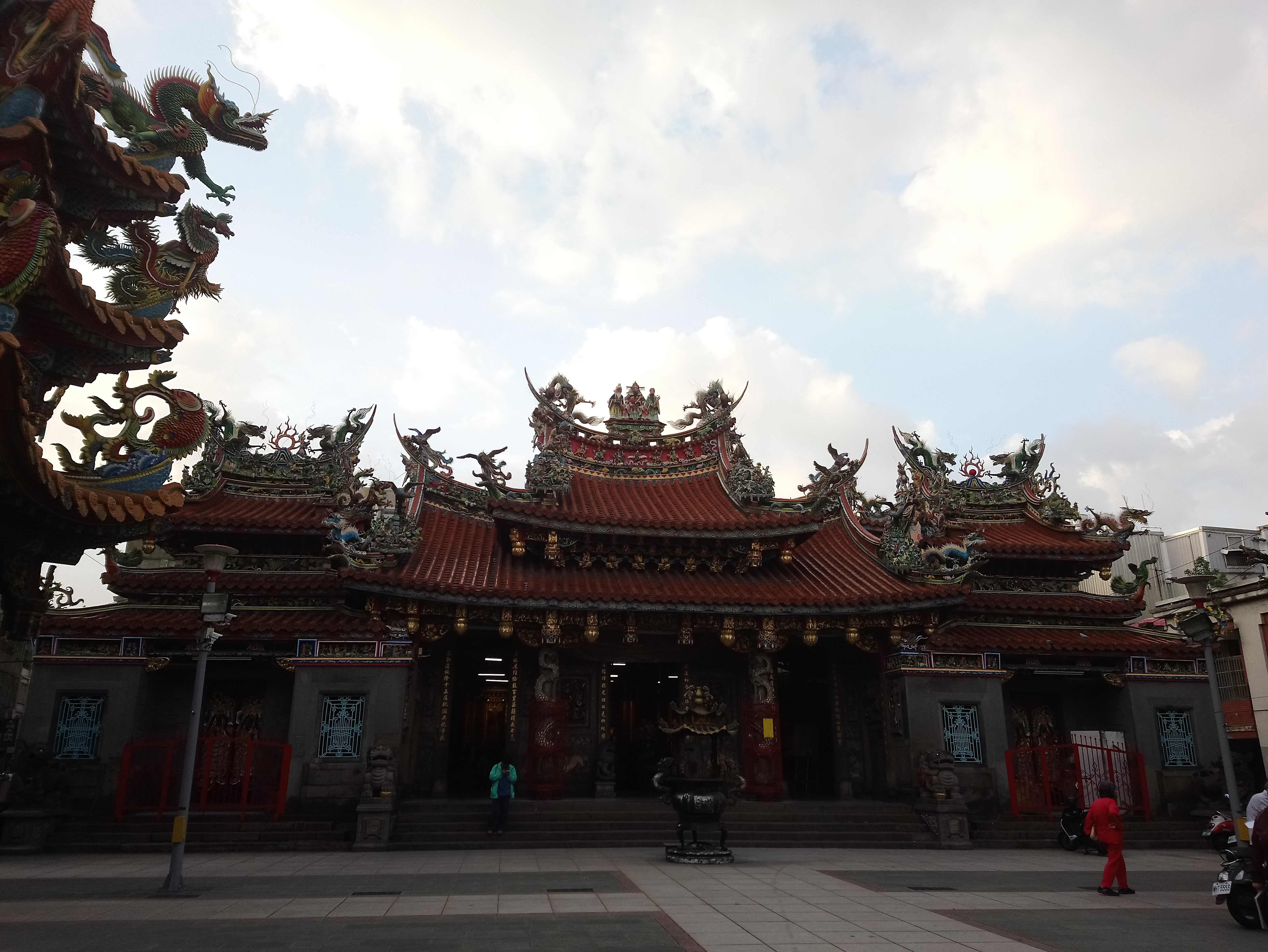 桃園景福宮(桃園大廟),桃園市桃園區市中次分區中和里